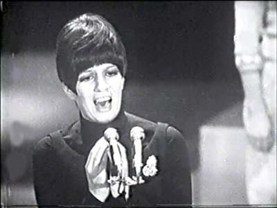 La cantante Iva Zanicchi al Festival di Sanremo. Fonte: rivista del 1968.